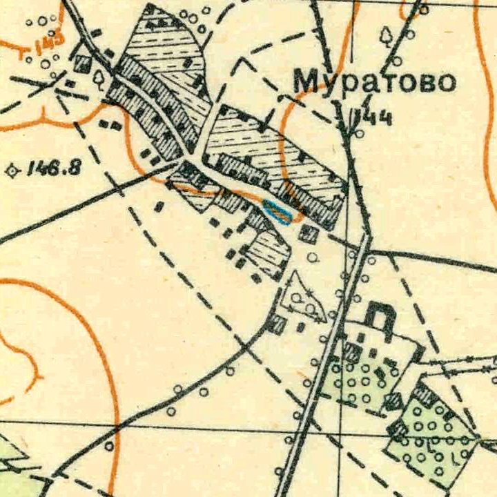 Топографическая карта Ленинградской области, квадрат О-35-24-А-в (Торосово), деревня Муратово